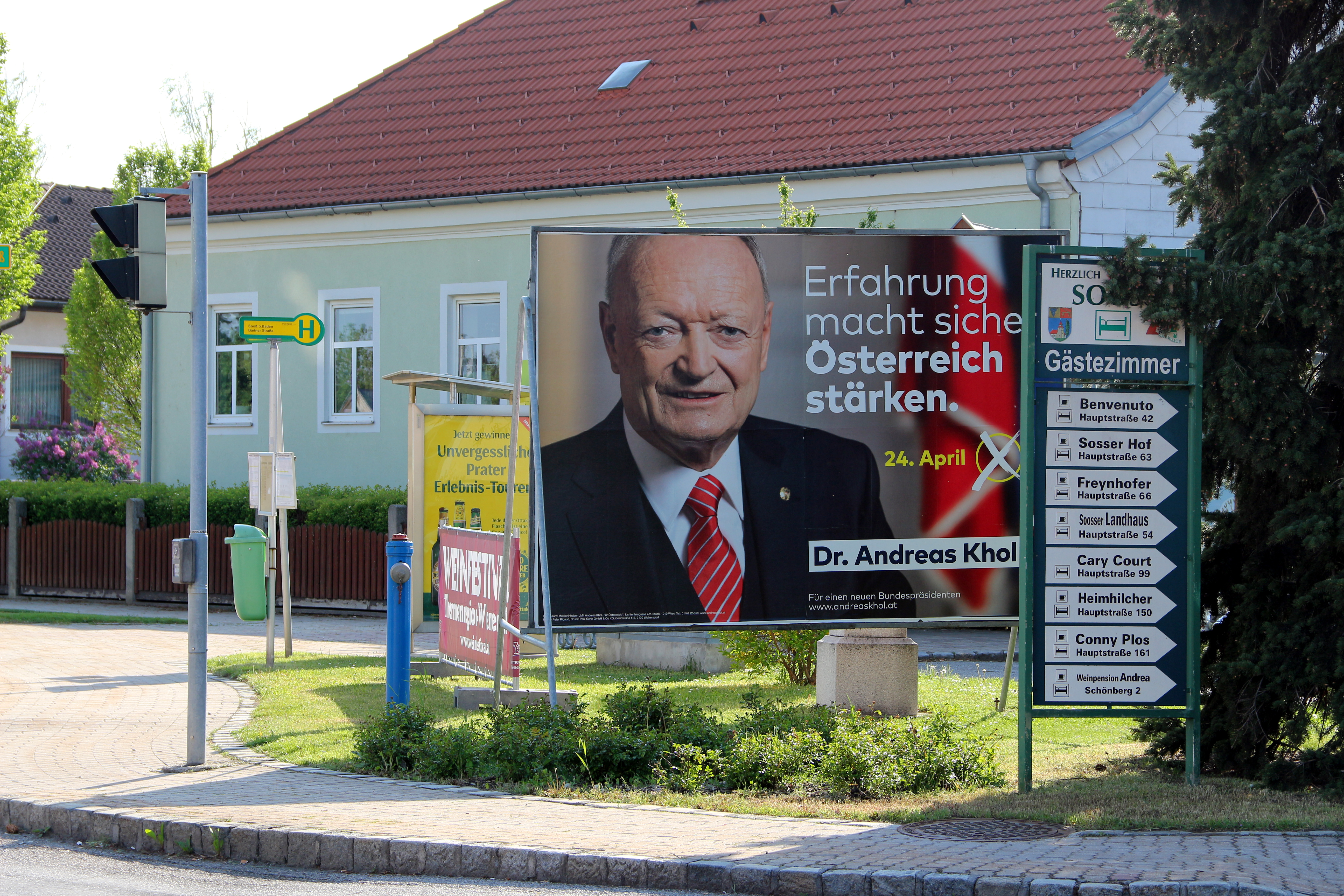 Bushaltestelle Badner Straße in Sooß, Niederösterreich. Daneben in Wahlplakat für den ÖVP-Präsidentschaftskandidaten Andreas Khol.